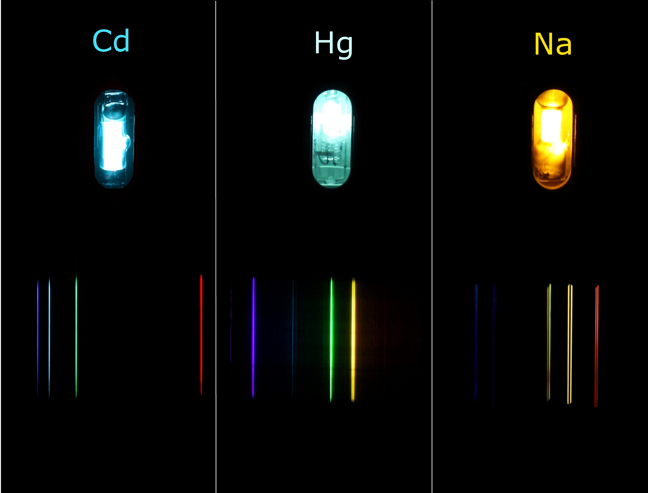 Metalldampflampen (Niederdruck) mit fotografierten Spektren (Cd, Hg, Na)